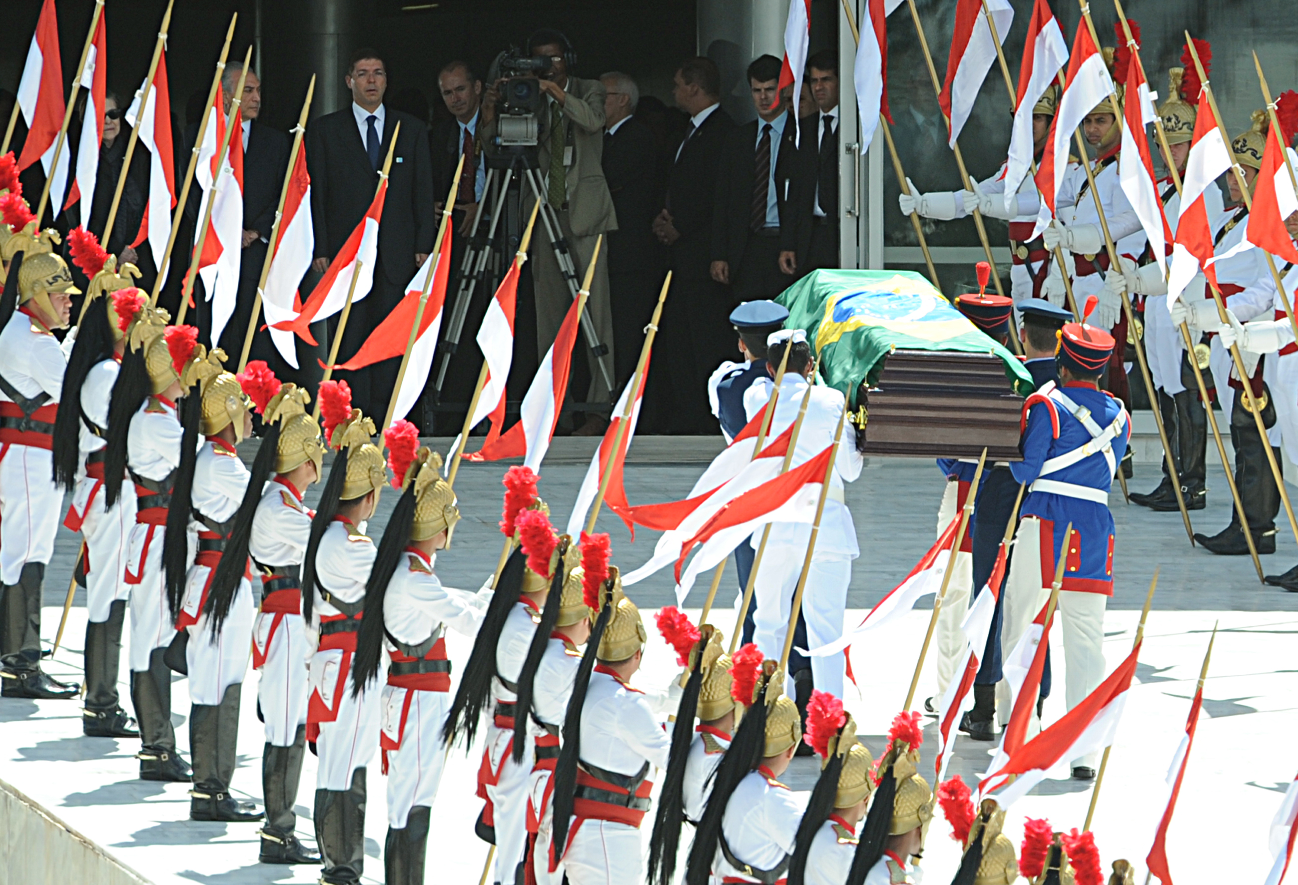 Brasília - O cortejo, com o corpo do ex-vice-presidente da República José Alencar,chega ao Palácio do Planalto, onde acontece o velório e cerimônias de homenagem